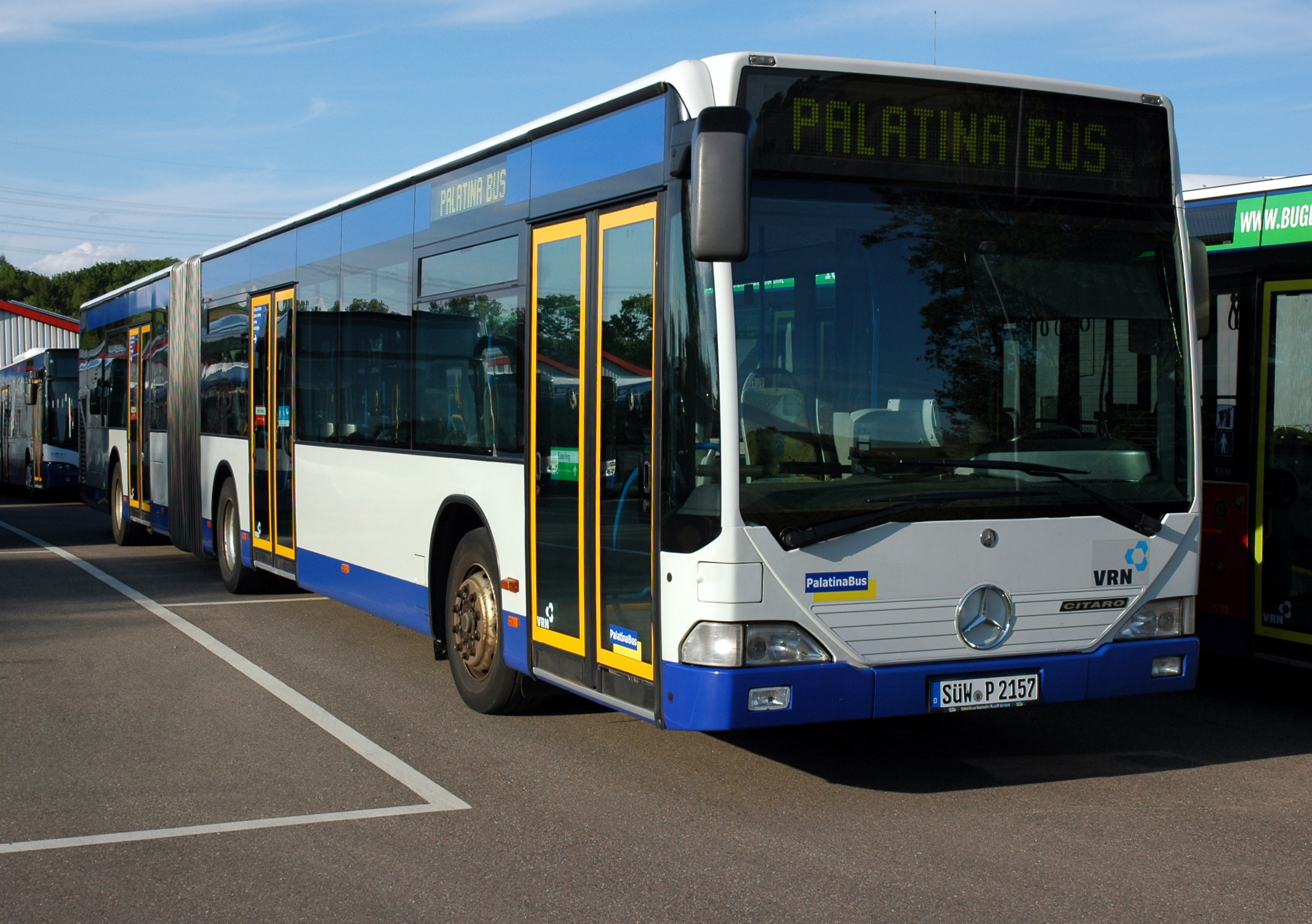 Weibstadt - PalatinaBus - Mercedes-Benz Citaro G - SÜW-P 2157